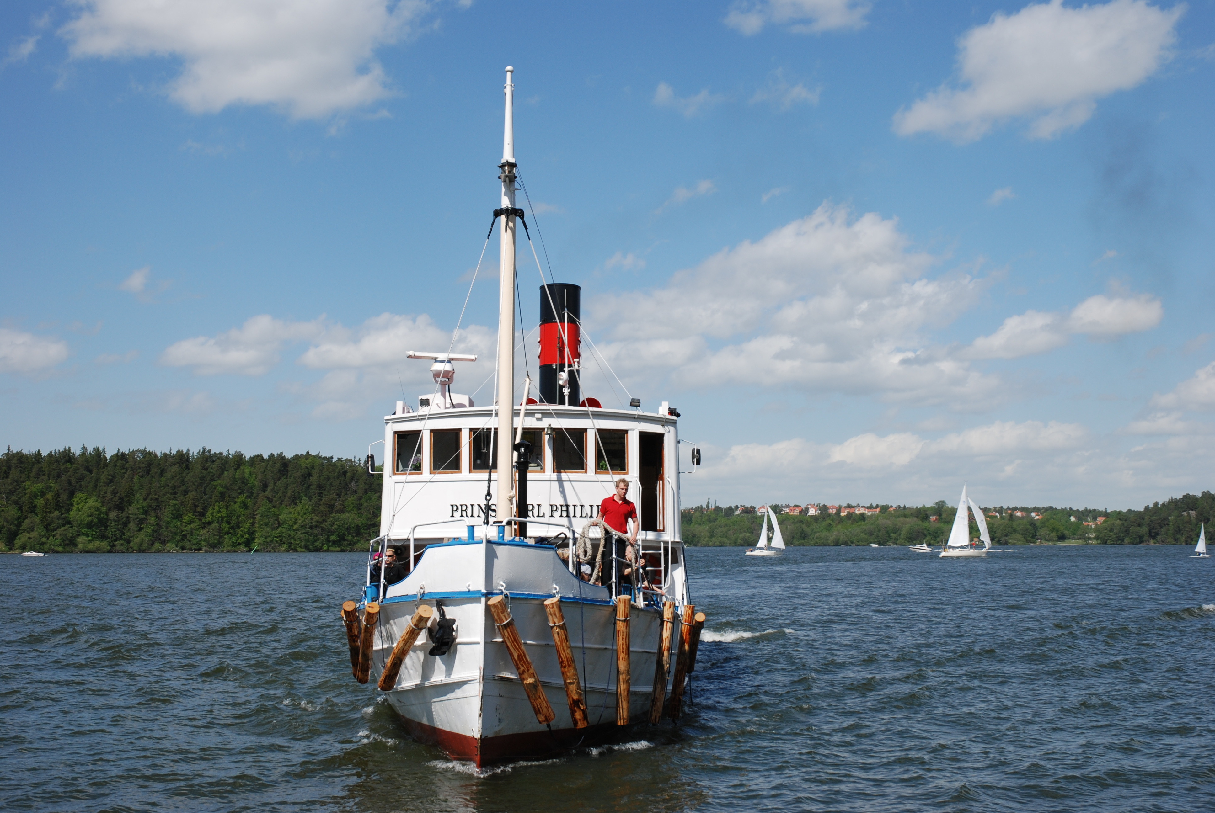 M/S Carl Philip at Mälarhöjden, a suburb of Stockholm, Sweden